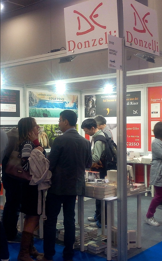 Stand edizioni Donzelli - salone del libro 2016